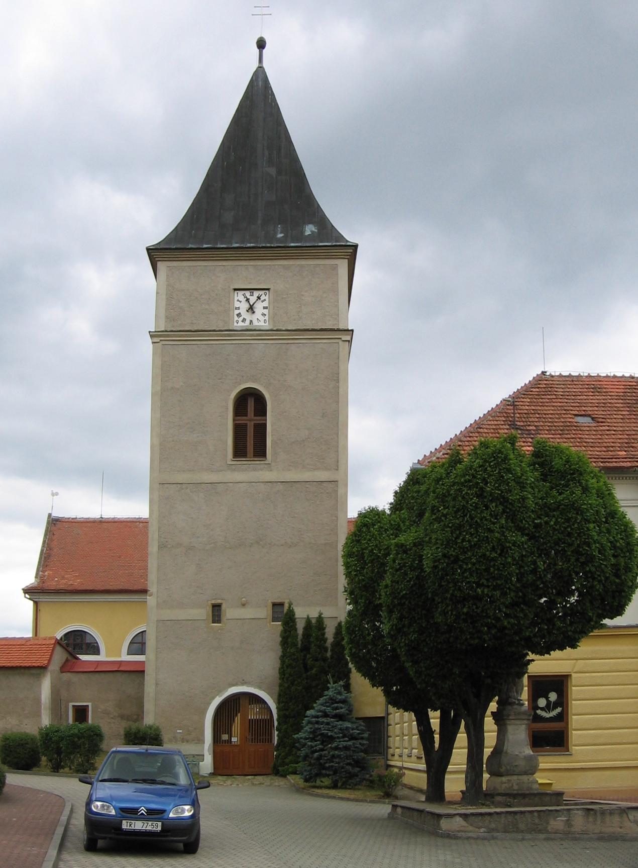 Mohelno - kostelní věž.